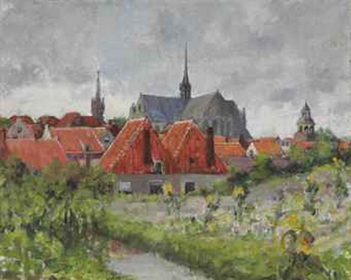 George Oberteuffer 1878-1940 View of Leiden, the Netherlands.jpg (Краєвид історичної частини міста Лейден, Нідерланди)